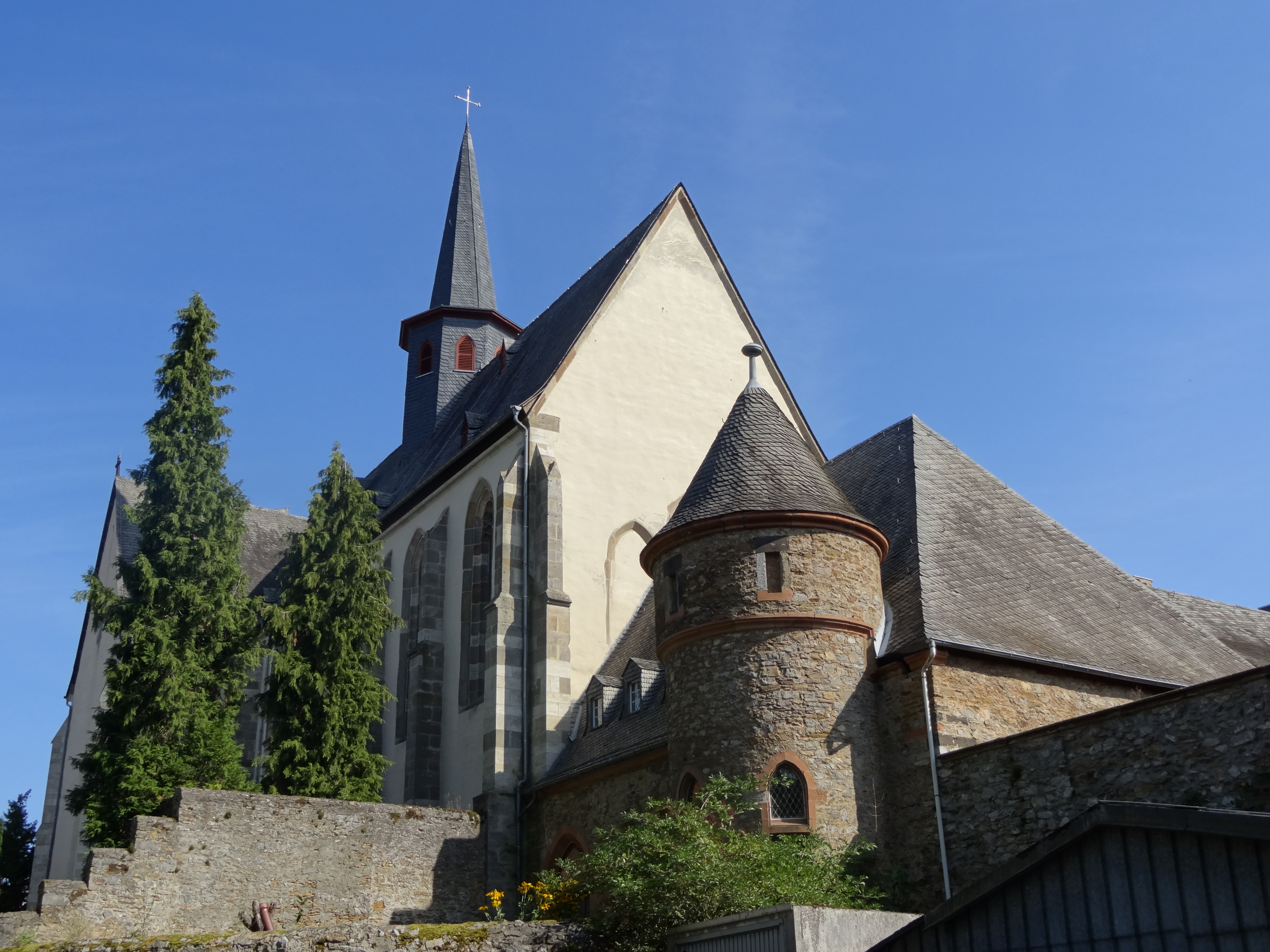 Kloster Altenberg (Solms)